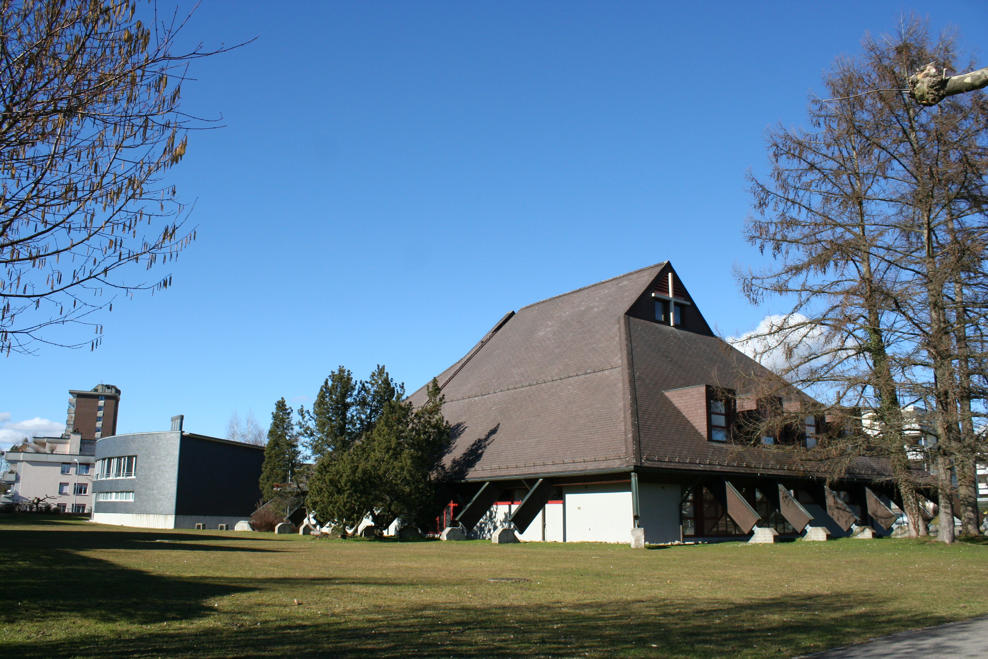 Römisch-katholische Pfarrkirche Heilig Geist Wetzikon, Aussenansicht